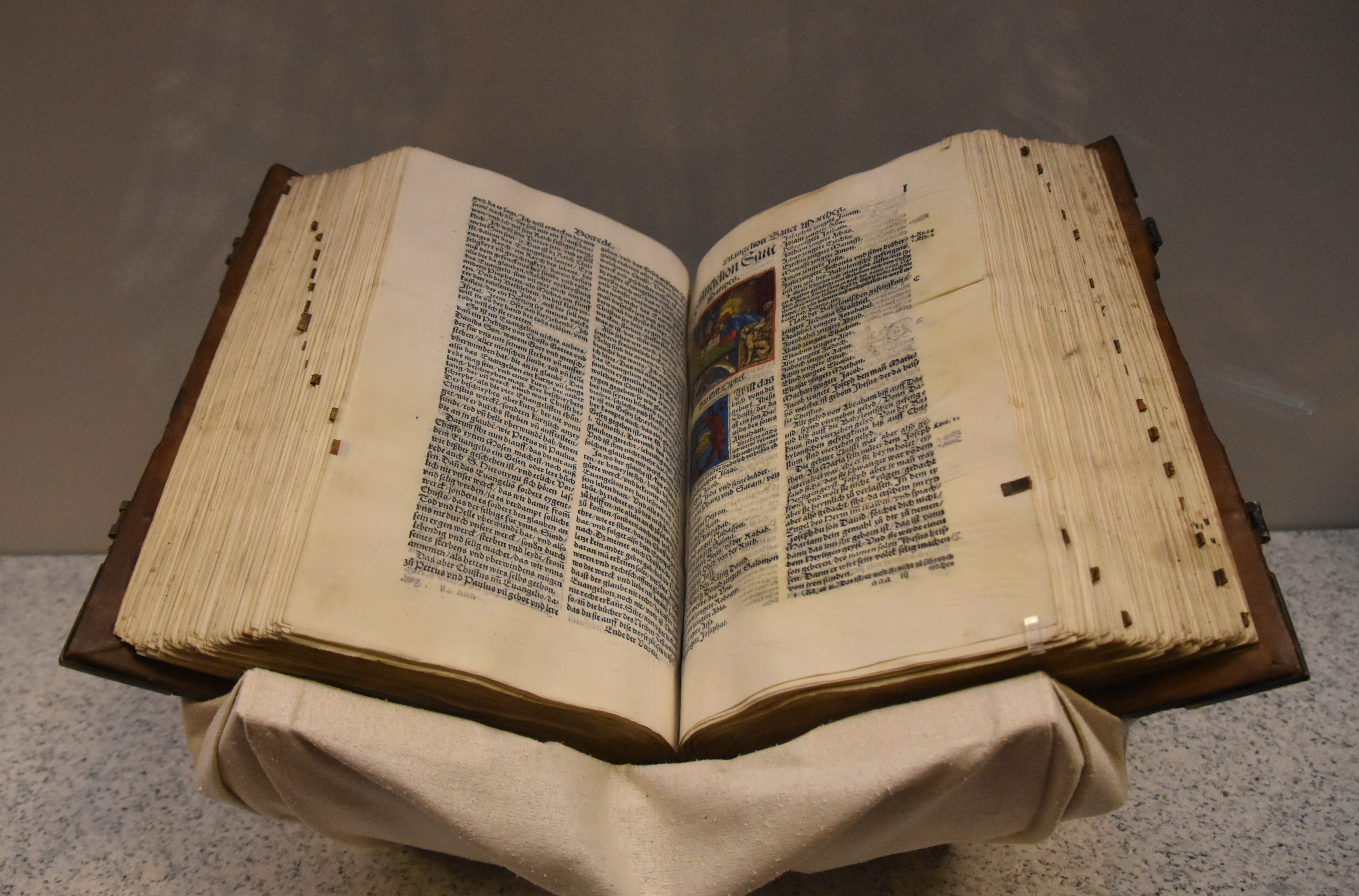 Ortenburg Bible, Augsburg, 1535, parchment, Deutsches Historisches Museum, Berlin (2)